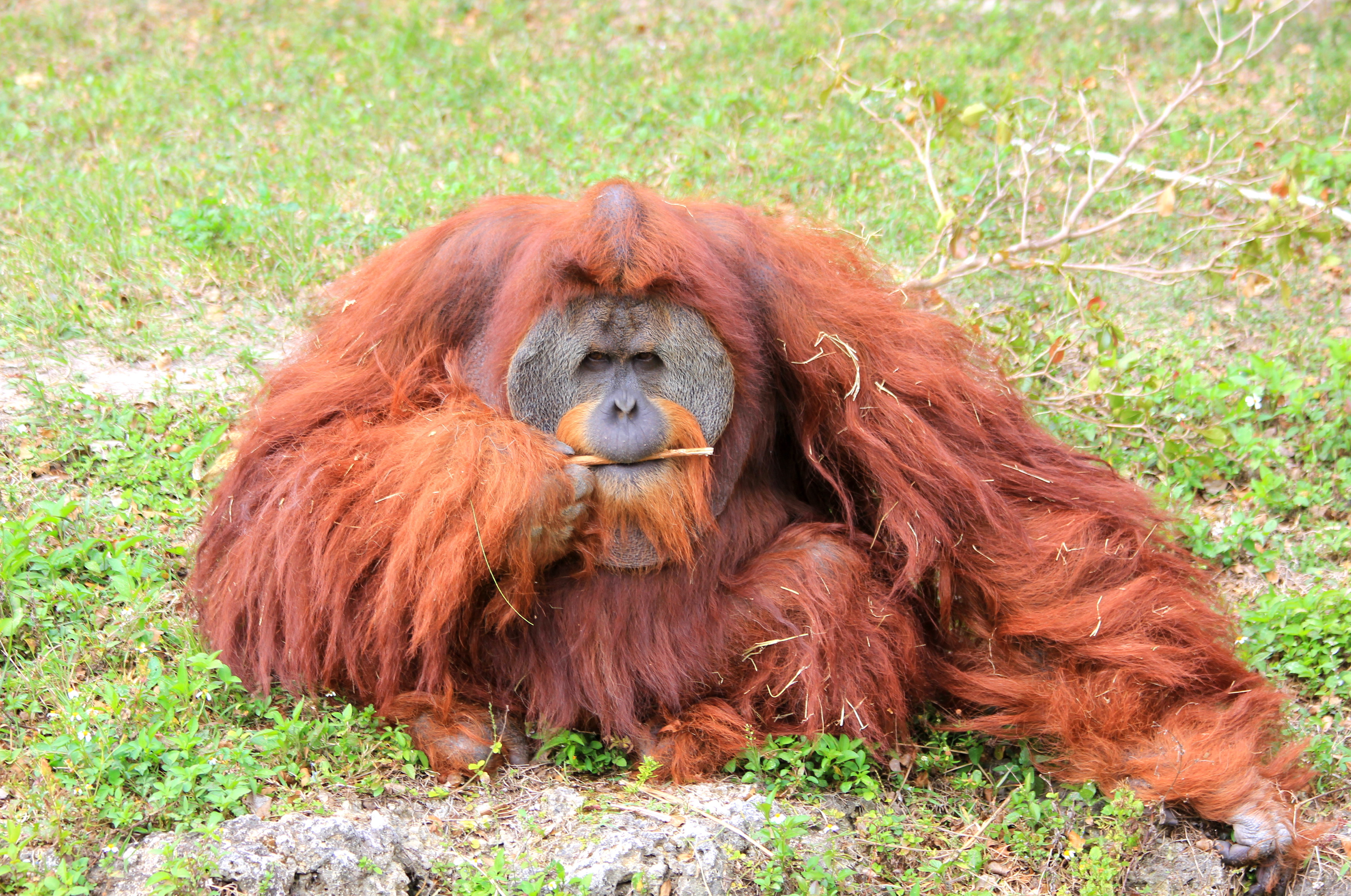 ORANGUTAN